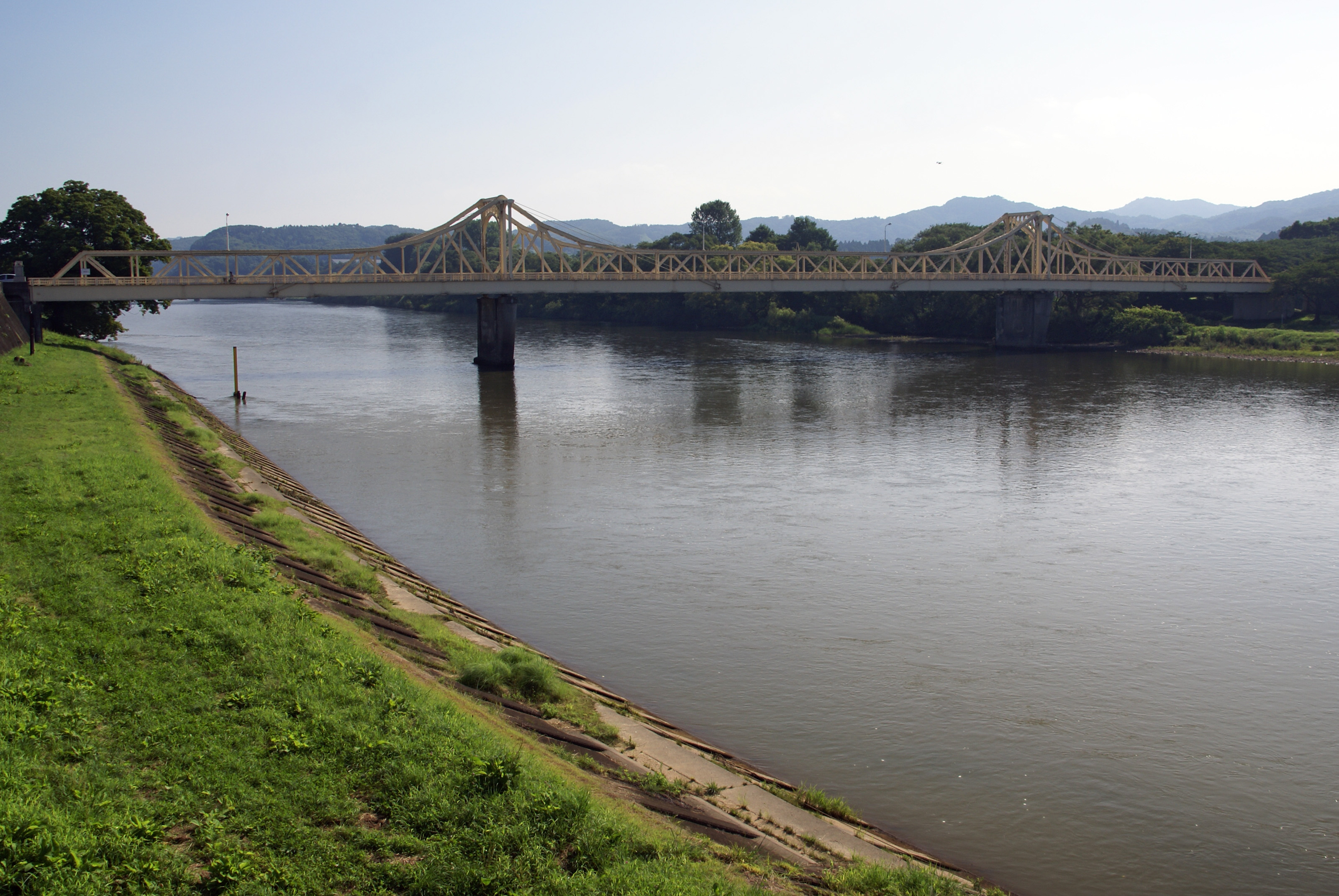 Kitakami River at Kitakami, Iwate prefecture, Japan